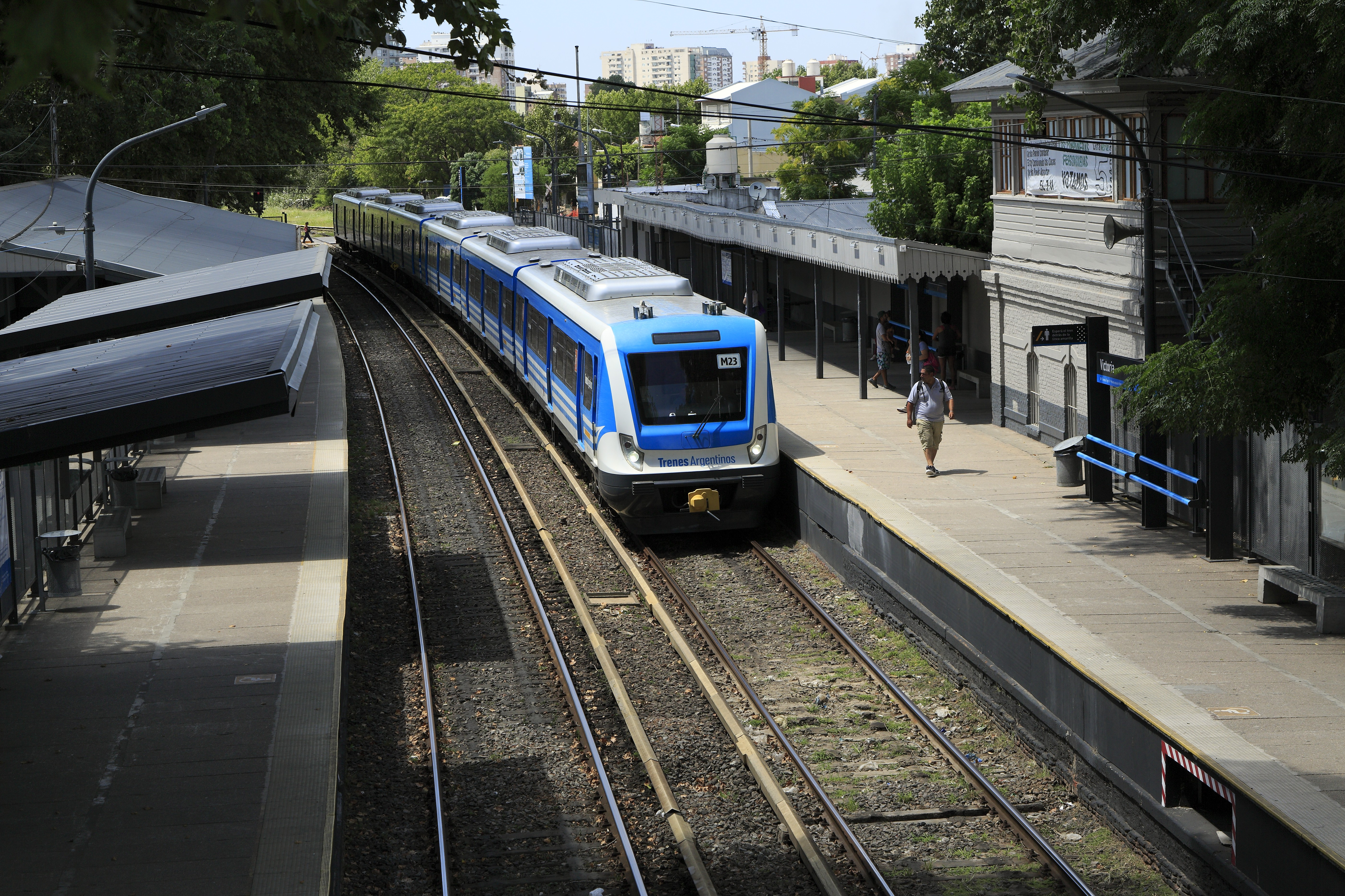 Zug Richtung Tigre bei der Einfahrt von der typisch britischen Fußgängerbrücke zwischen den Bahnsteiggleisen. Die Trennung mit der Strecke nach Matheu und Capilla del Señor liegt im Hintergrund hinter dem Bahnsteigende. Die CSR-Triebzüge verkehren auf den Mitre-Strecken in der Regel als Sechswageneinheiten.